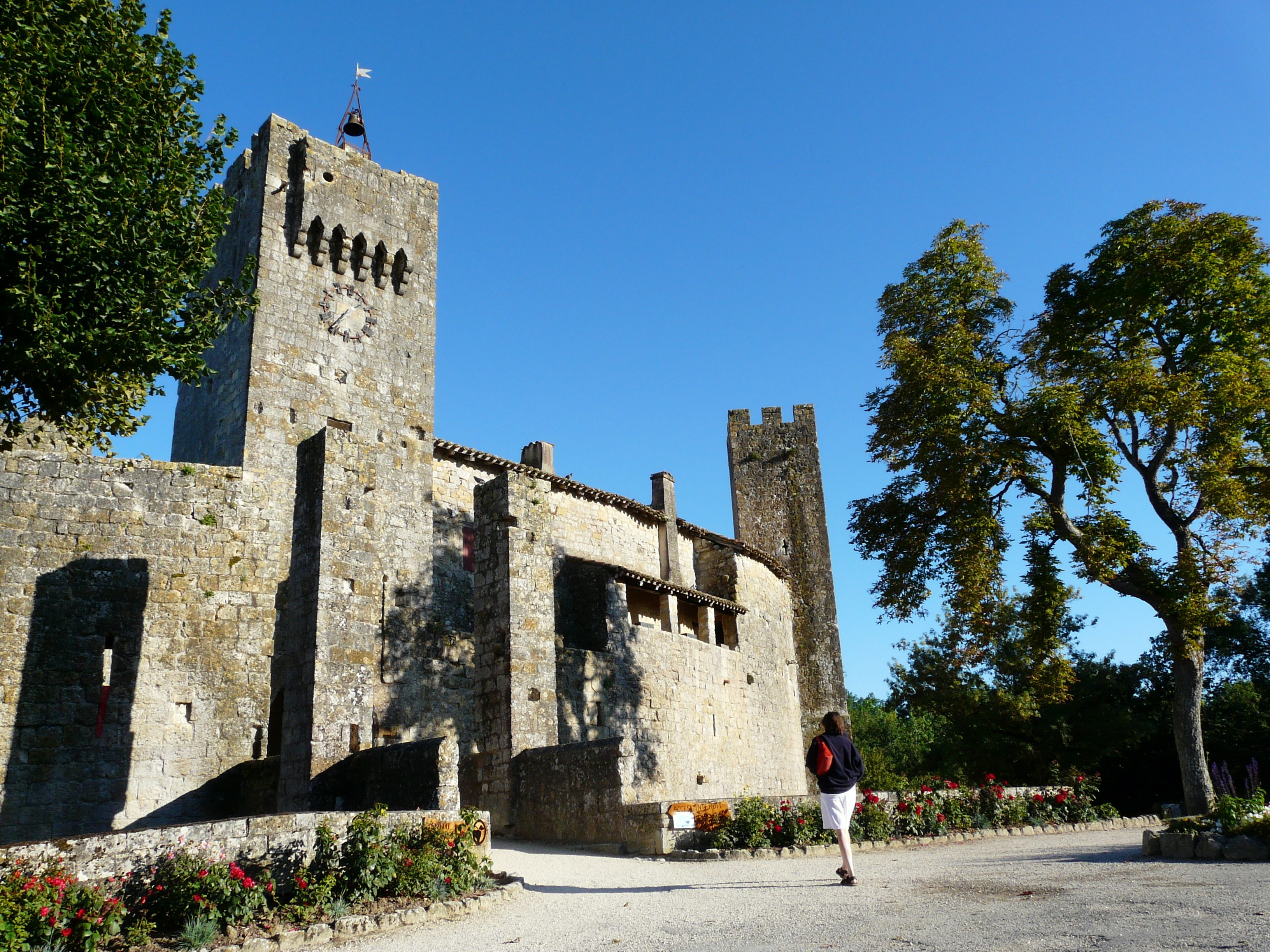 Enceinte fortifiée de Larressingle, tour Ouest This building is en partie classé, en partie inscrit au titre des Monuments Historiques. .